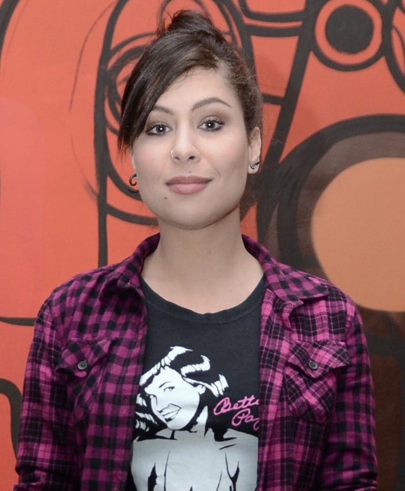 Foto: Marcos Madi